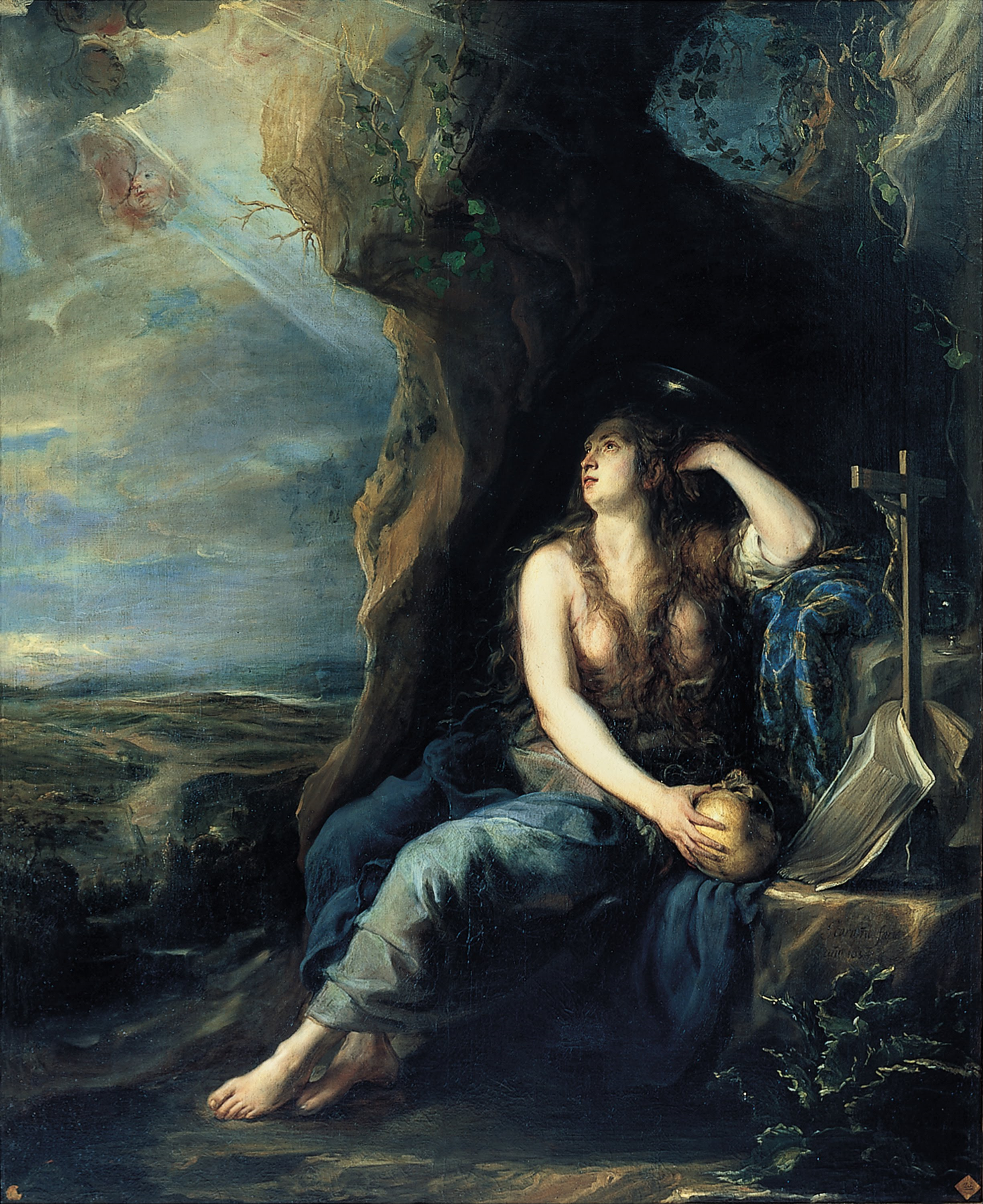 El lienzo representa a María Magdalena hacienda penitencia por sus pecados.